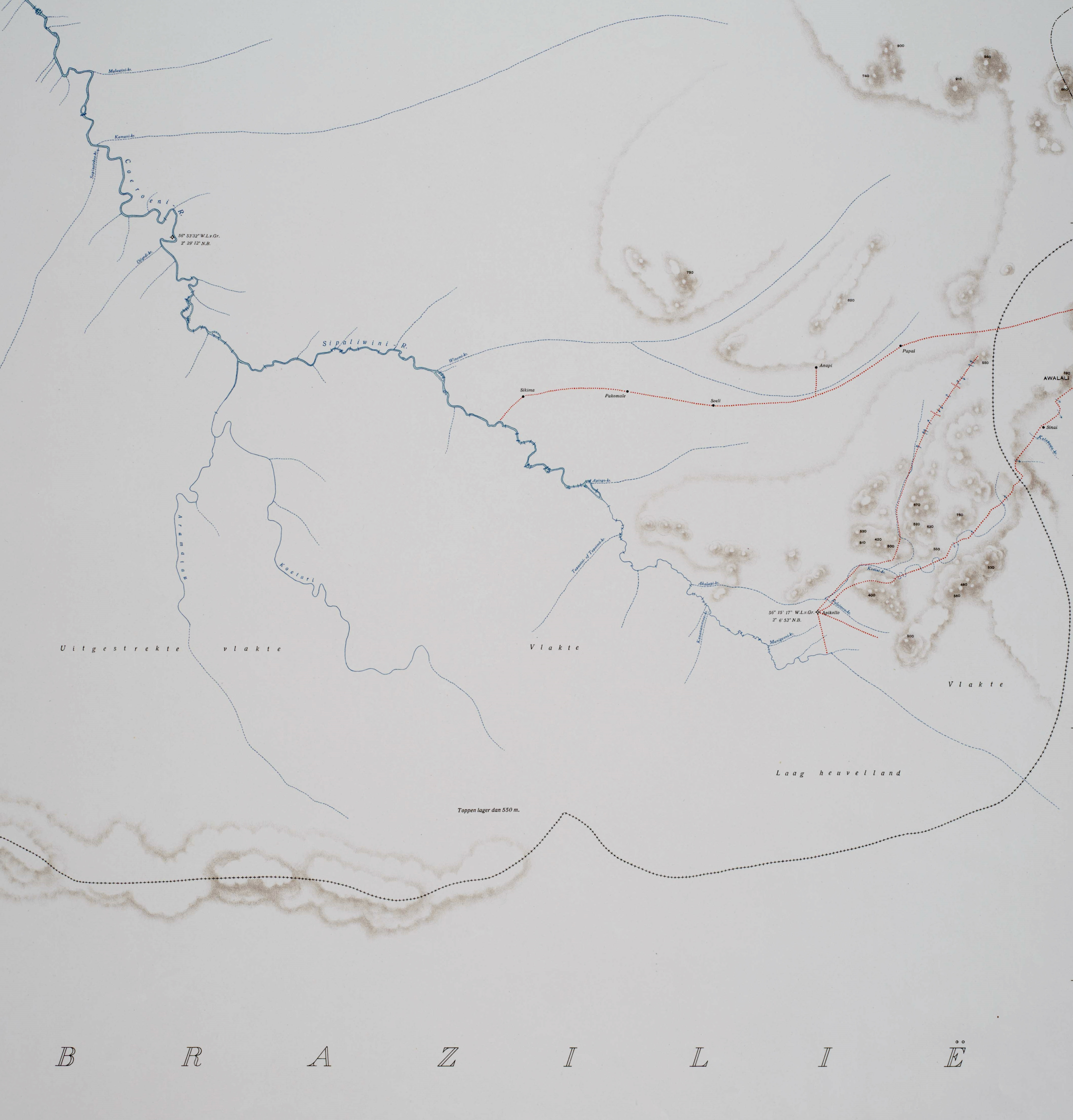 bearbeitete Karte des südwestlichen Teils von Suriname mit den Flüssen Sipaliwini und Coeroeni